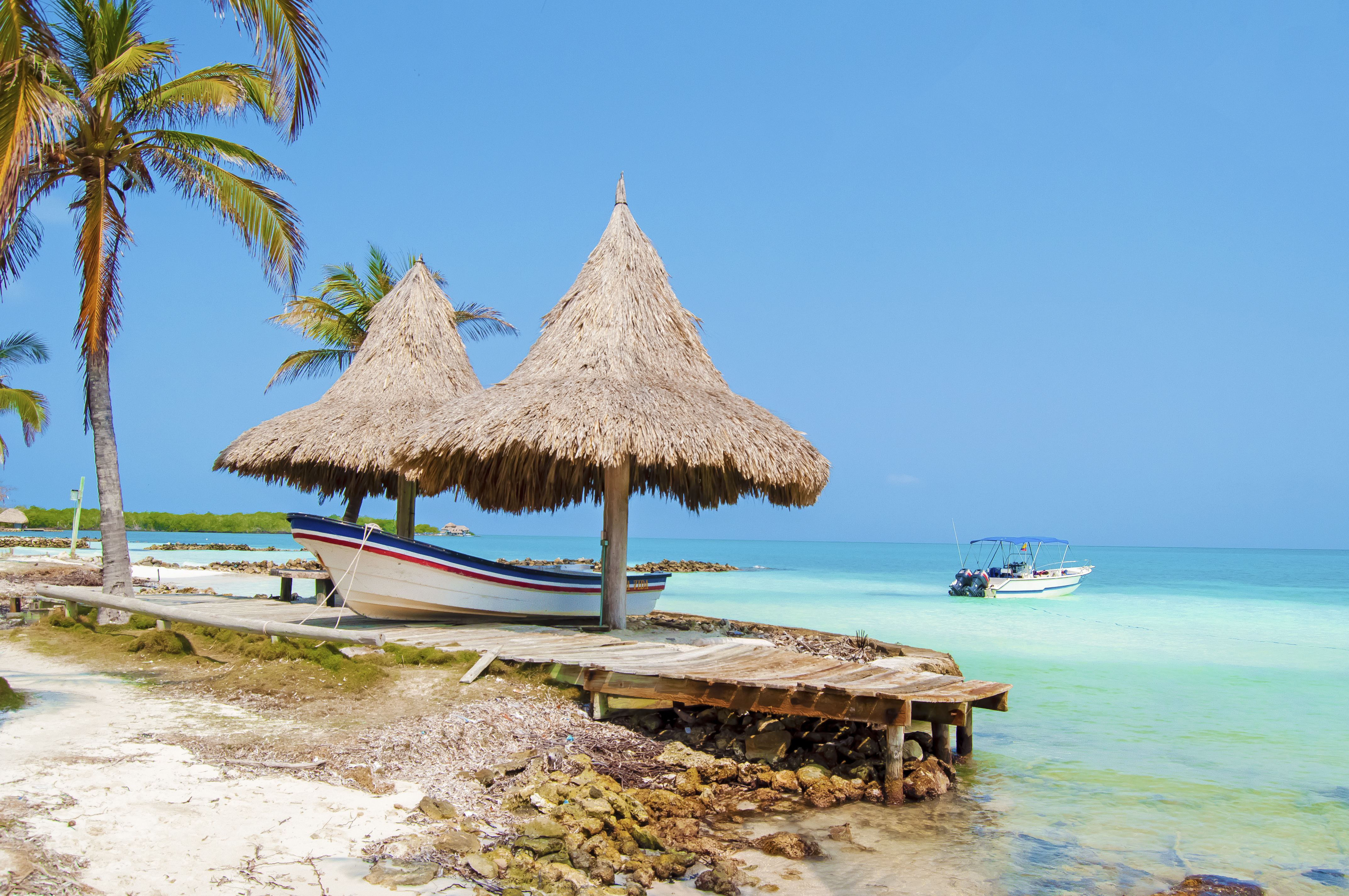 Isla Tintipán es un paraíso en el departamento de Bolivar y nos regala escenas para siempre soñar. Esta fotografía fue tomada en el municipio colombiano con código 13001.